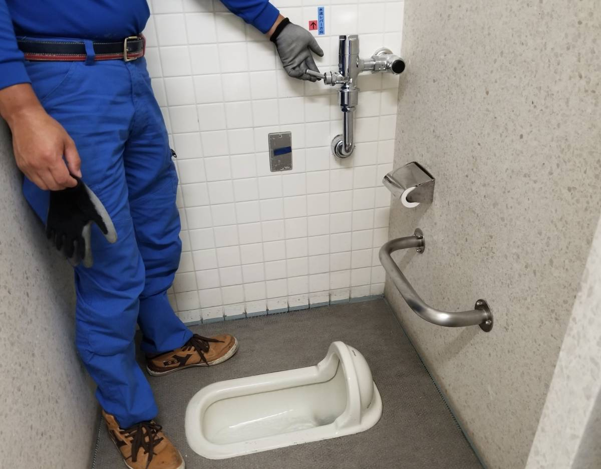 C75試運転